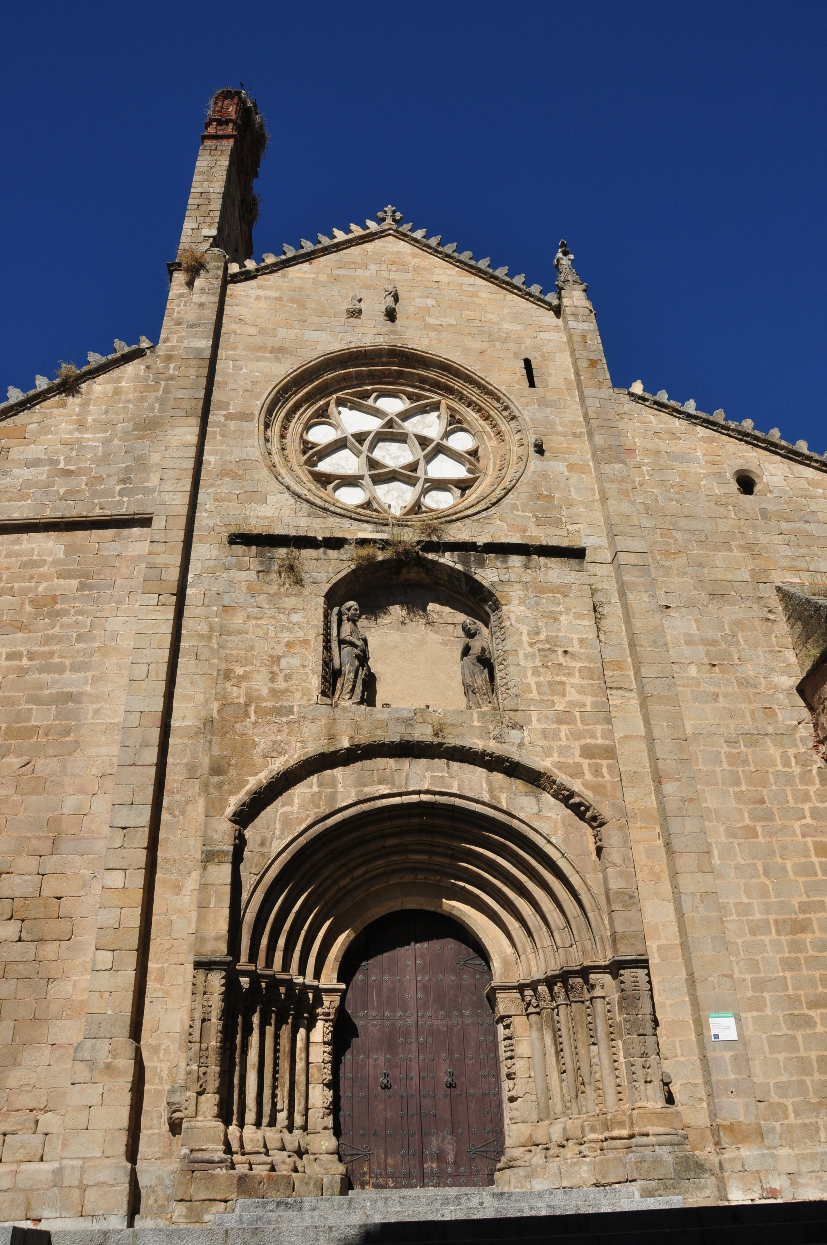 Fachada románica de la Catedral Vieja de Plasencia.